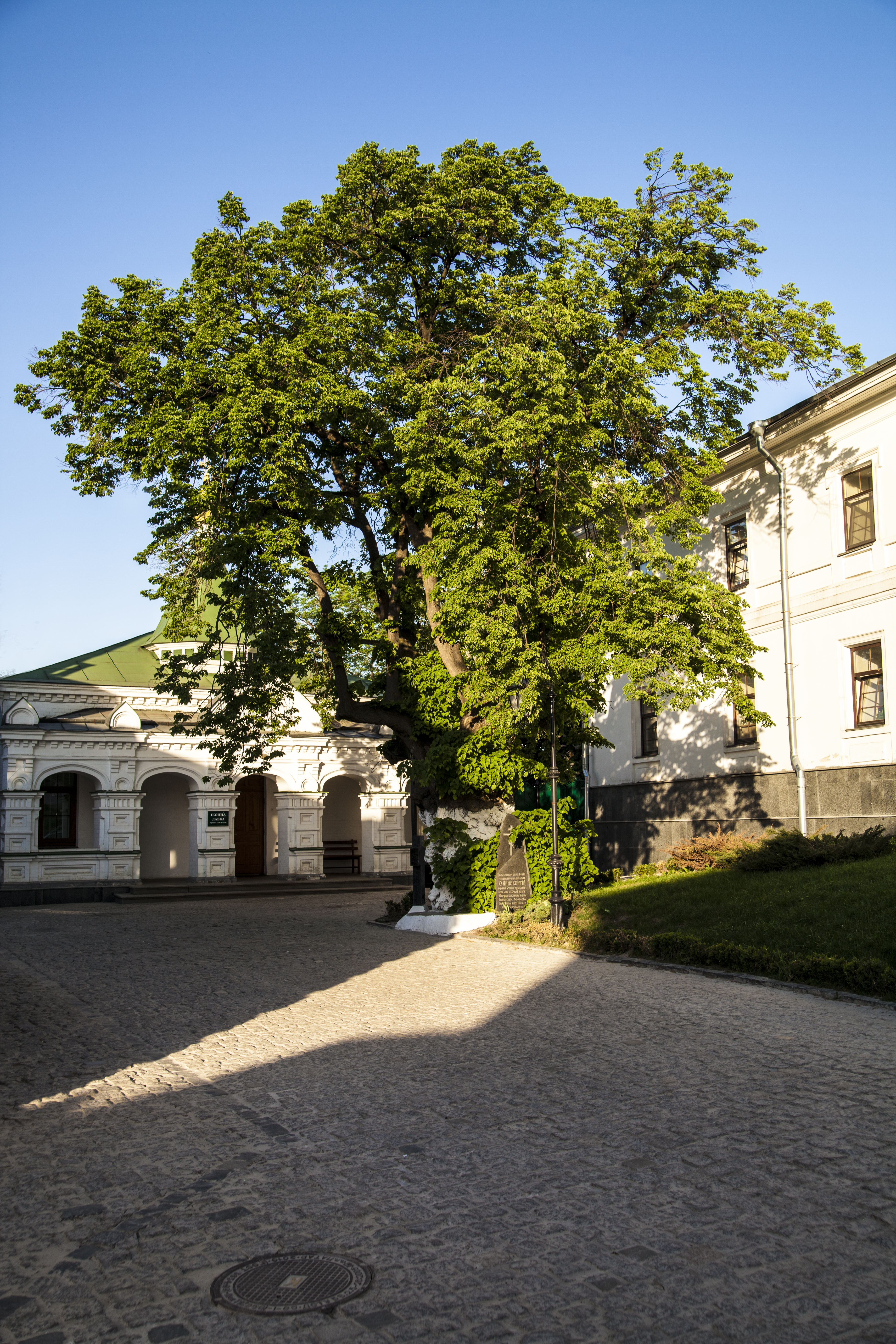 500—600 років. Обсяг 6,5 м. Висота 18 м. Липа на 300-400 років молодше за Феодосія Печерського, який її начебто посадив.